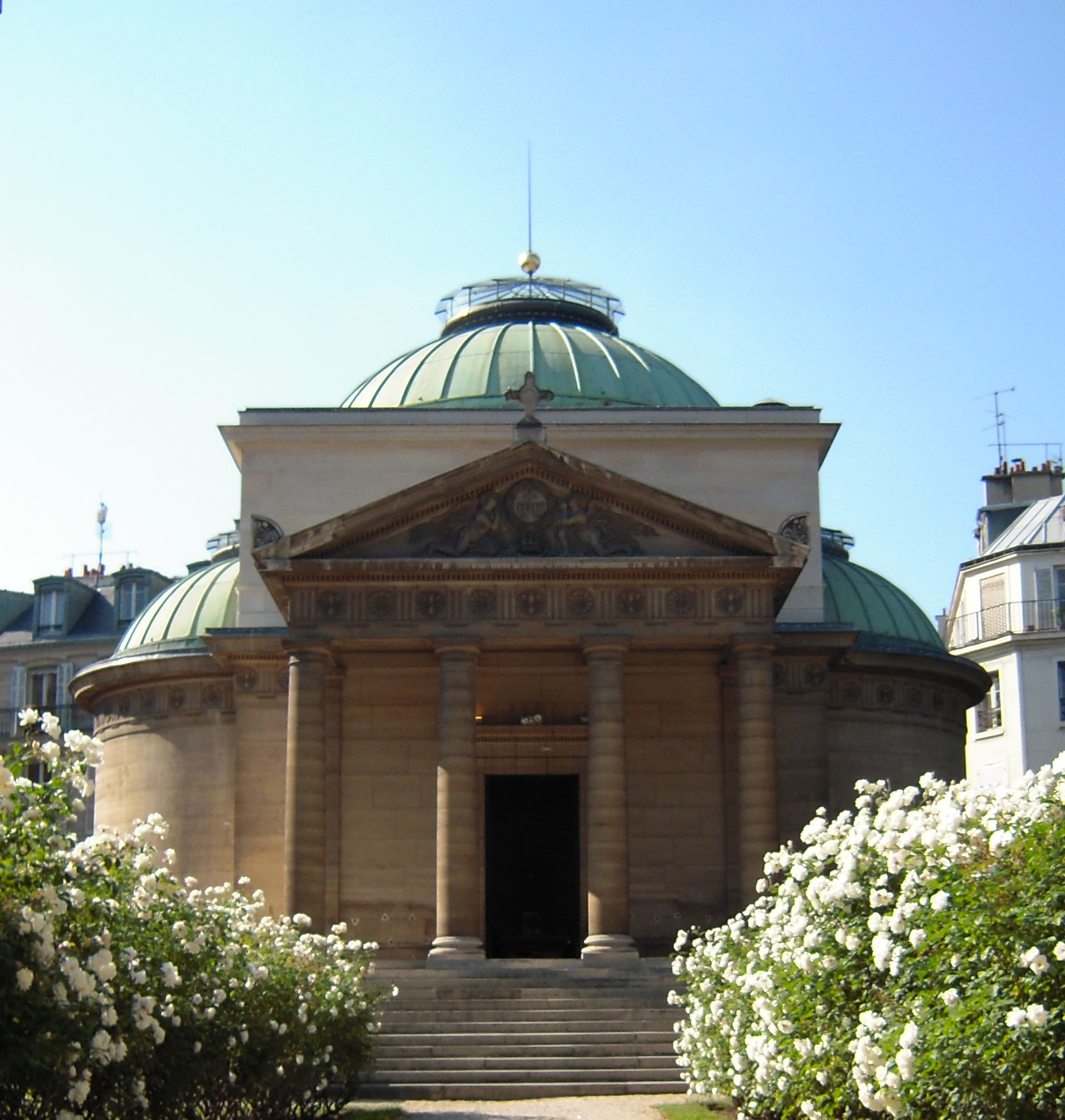 Façade de la Chapelle Expiatoire - Paris